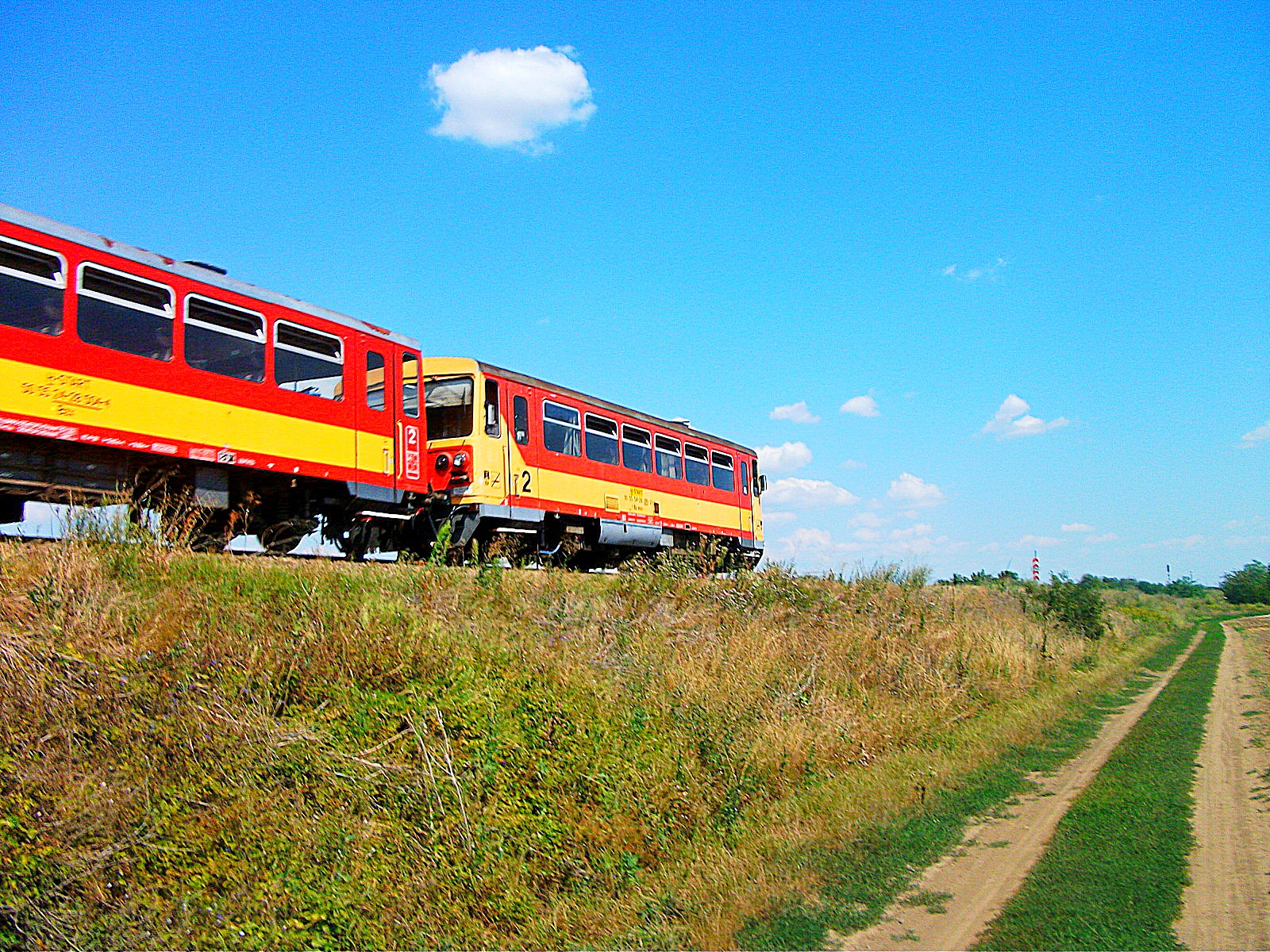 Bzmot a Székesfehérvár–Pusztaszabolcs-vasútvonalon Zichyújfalu község határában.